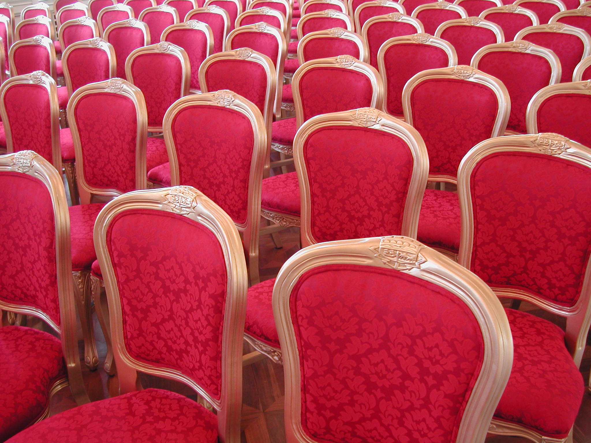 Photo des chaises de la salle d'apparât de l'hôtel de ville de Saint-Denis de la Réunion.